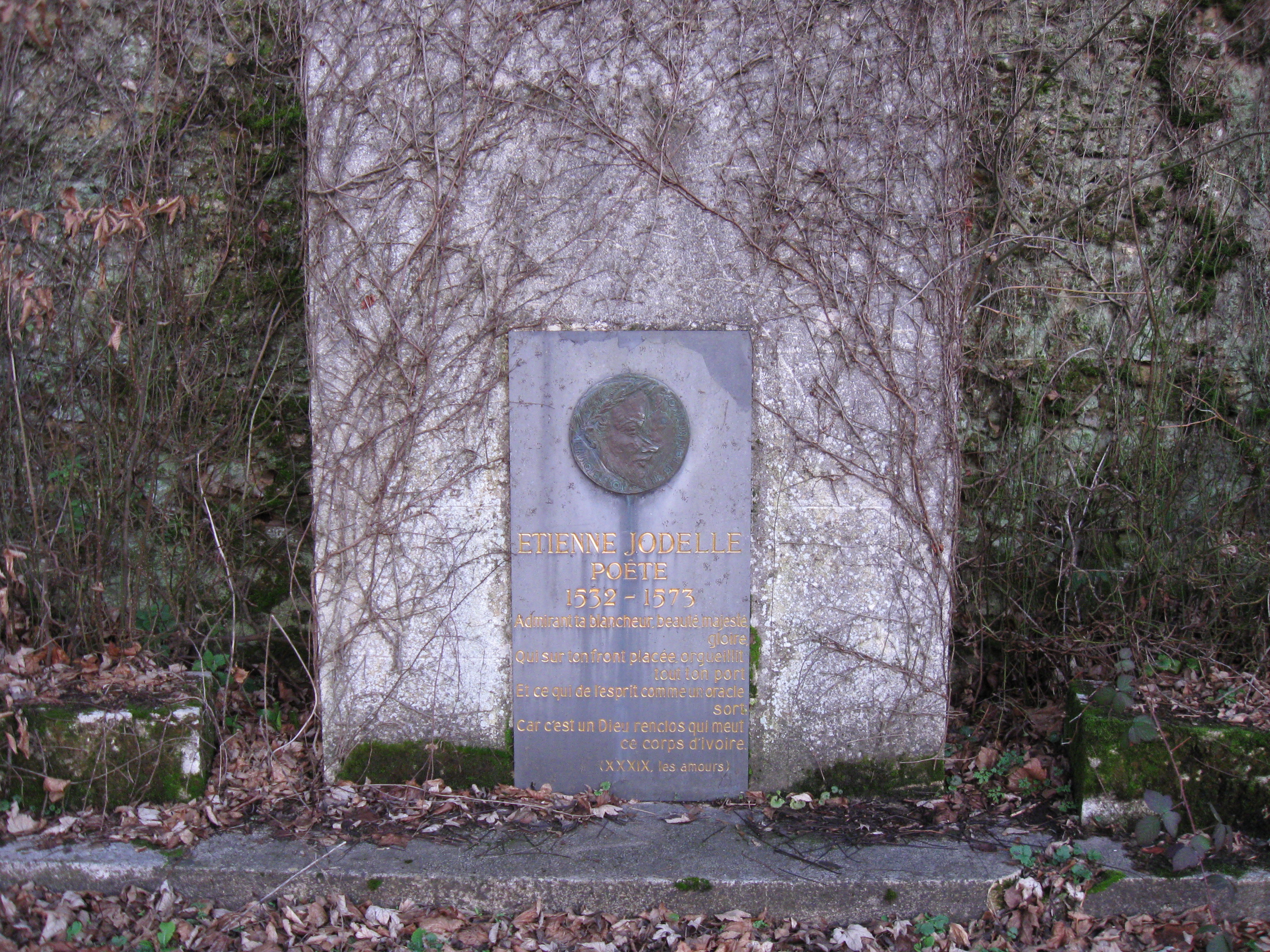 Stèle dédiée à Étienne Jodelle, rue Etienne-Jodelle. (La Houssaye-en-Brie, Seine-et-Marne, région Île-de-France).